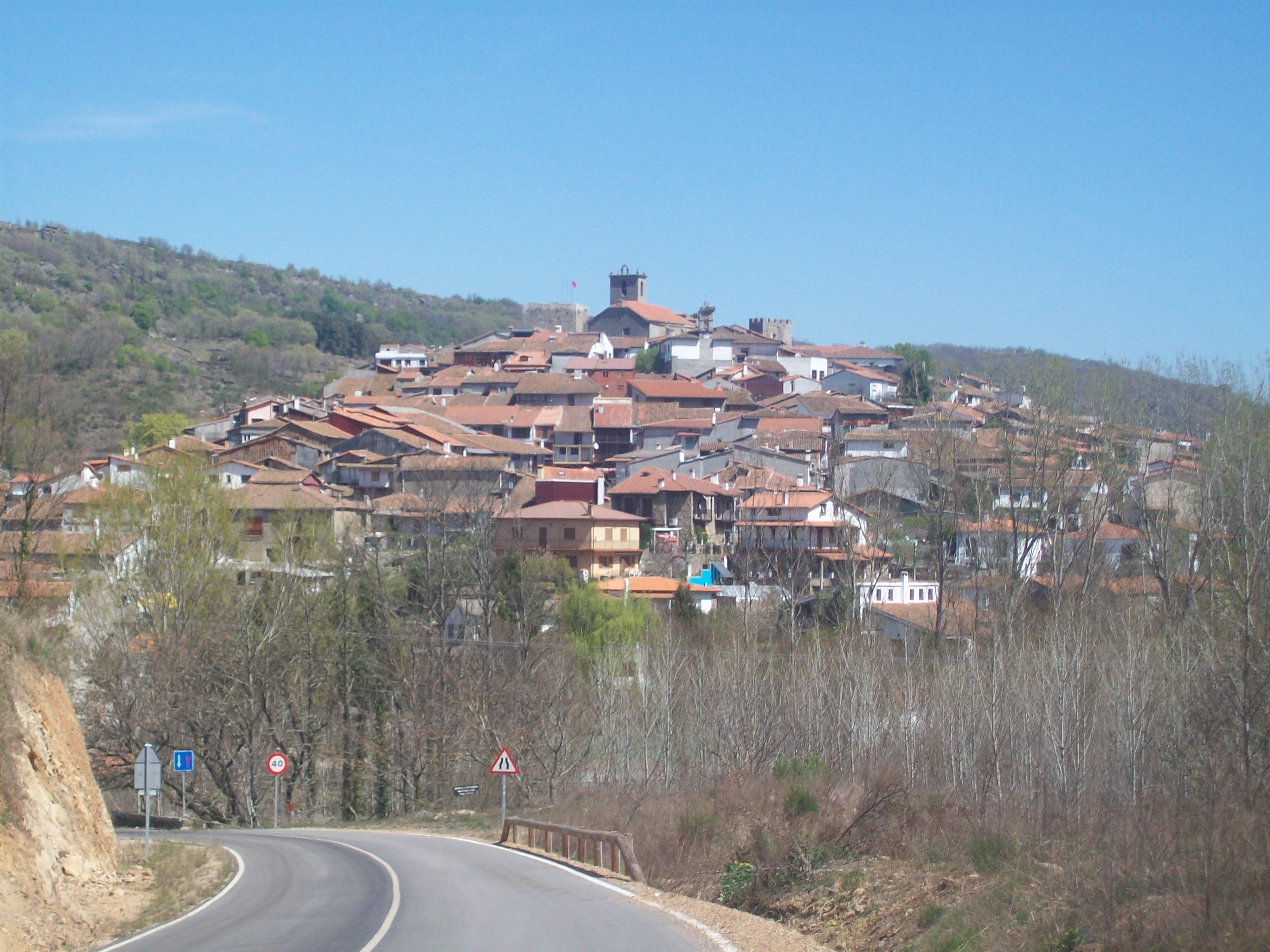 Esta ye una semeya del pueblu dende la carretera llocal.